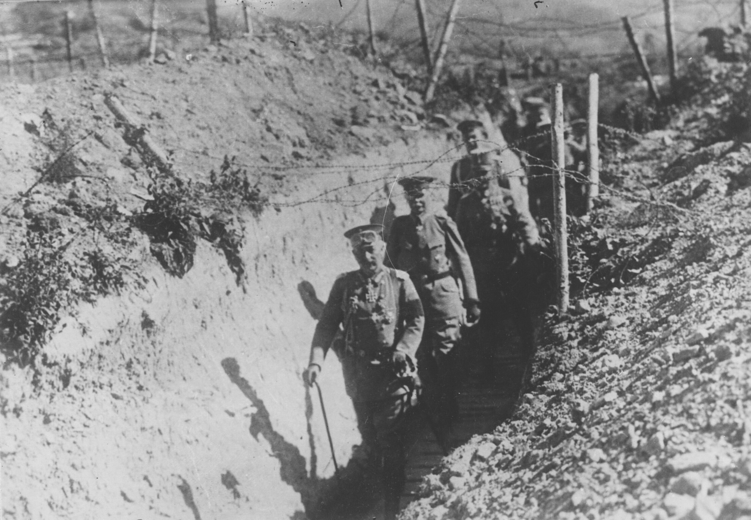 Kaiser Wilhelm II. durchschreitet am 4. April 1918 bei einem Frontbesuch während der Frühjahrsoffensive einen Verbindungsgraben (amtliche deutsche Kriegsphotographie des Ersten Weltkriegs).Nähere Angaben zu dem Frontbesuch Ende März/Anfang April 1918 gibt es in den Tagebüchern Georg Alexander von Müllers, vgl. [1] (vorletzter Absatz).Der Mann gleich hinter Kaiser Wilhelm ist möglicherweise (?) Erich Ludendorff, der sich zu dieser Zeit in der Umgebung des Kaisers am Hauptquartier (seit Anfang März 1918 in Spa) aufhielt und von Statur, Kleidung und Gesicht nach Vergleichsfotos aus dieser Zeit zu passen scheint.